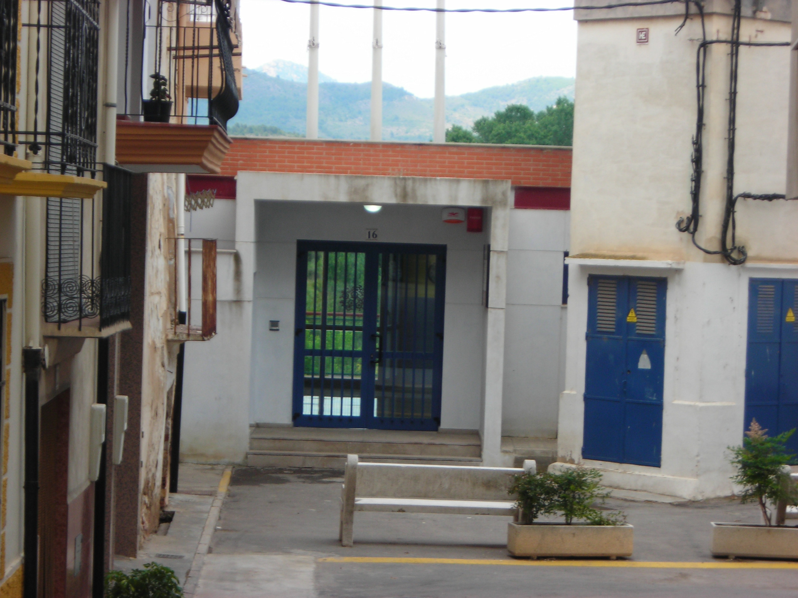 geldo